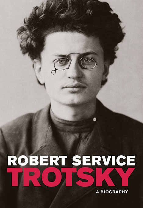 Service - Trotsky A Biography (2009, cover)